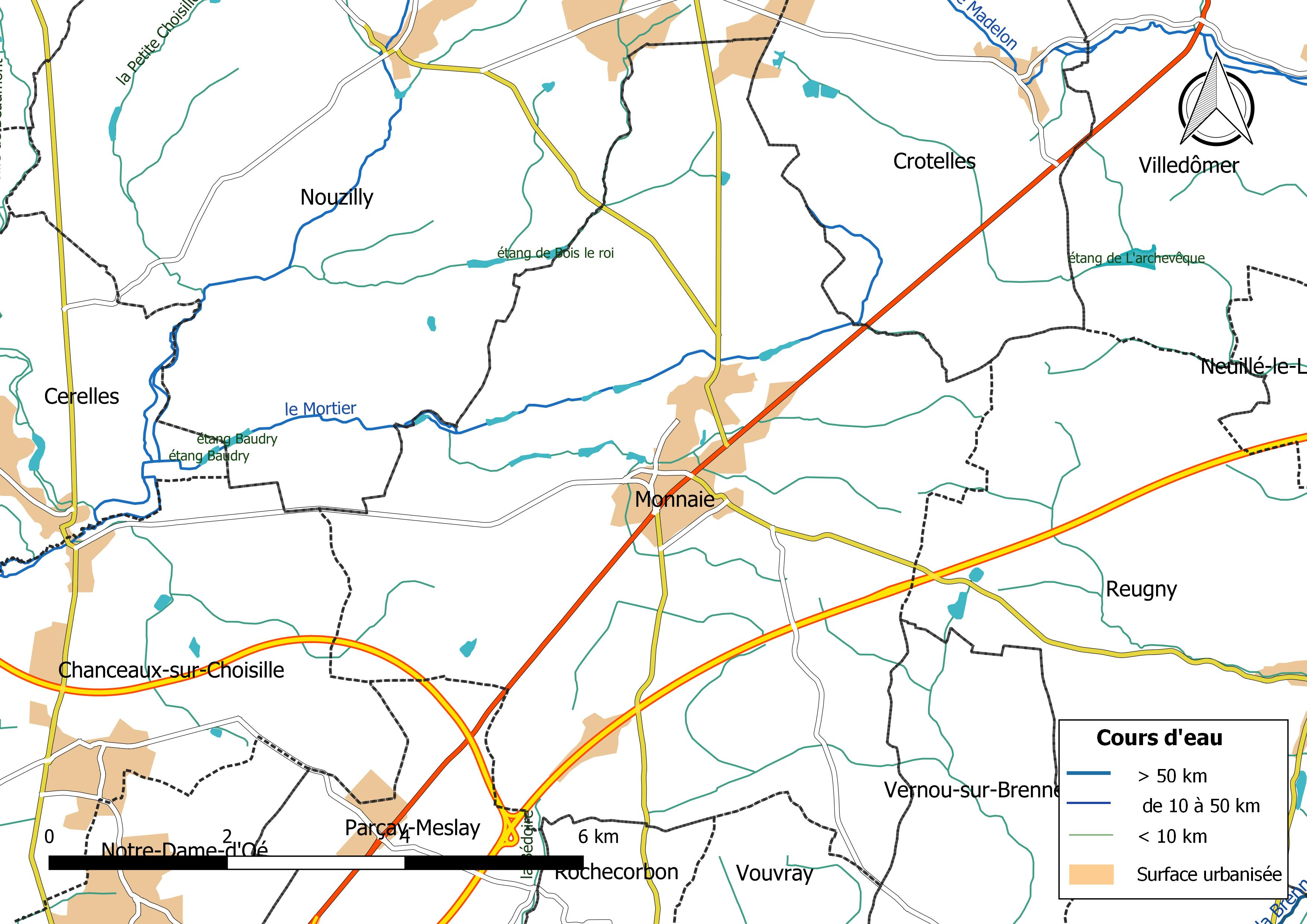 Carte du réseau hydrographique de la commune de Monnaie (Indre-et-Loire) (France).